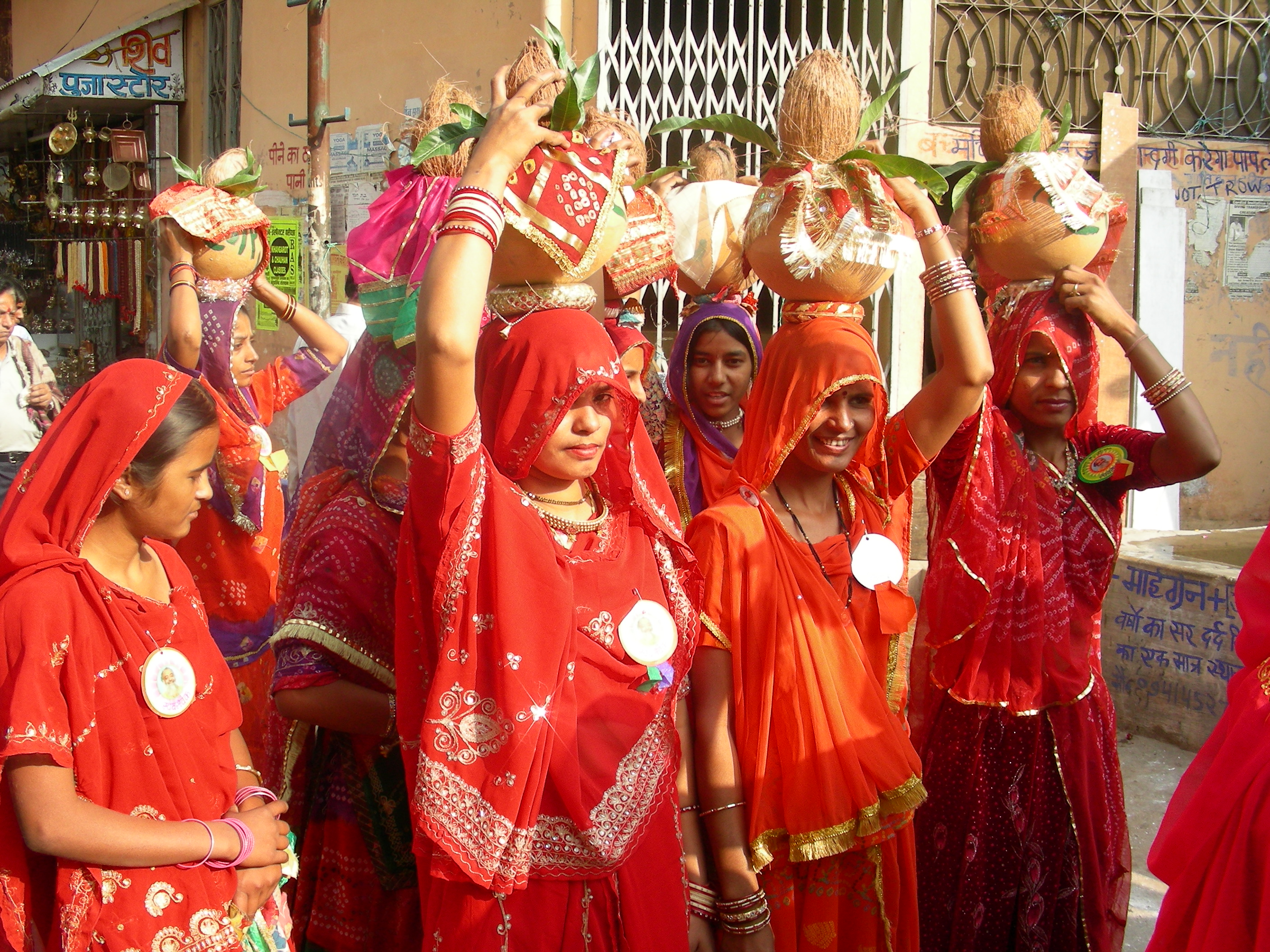 Pushkar, Rajasthan India